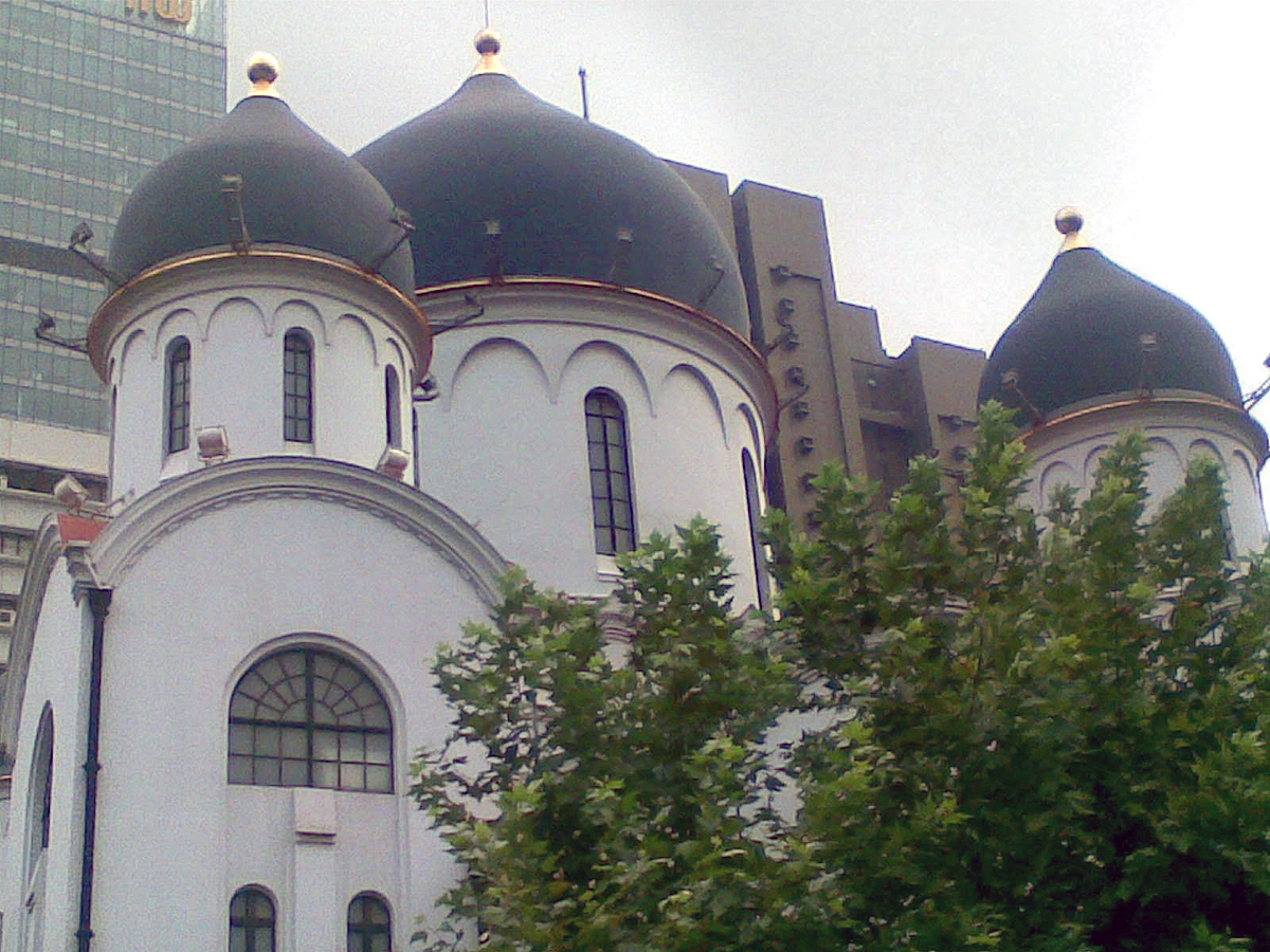 上海圣母大堂，于新乐路、襄阳南路交叉路口的西北角拍摄。